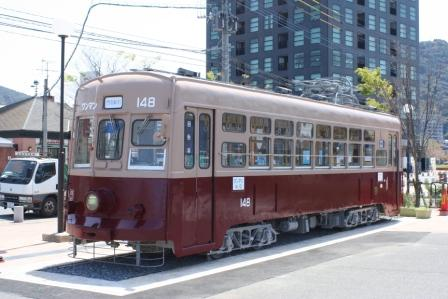 西鉄北九州線148（保存車）